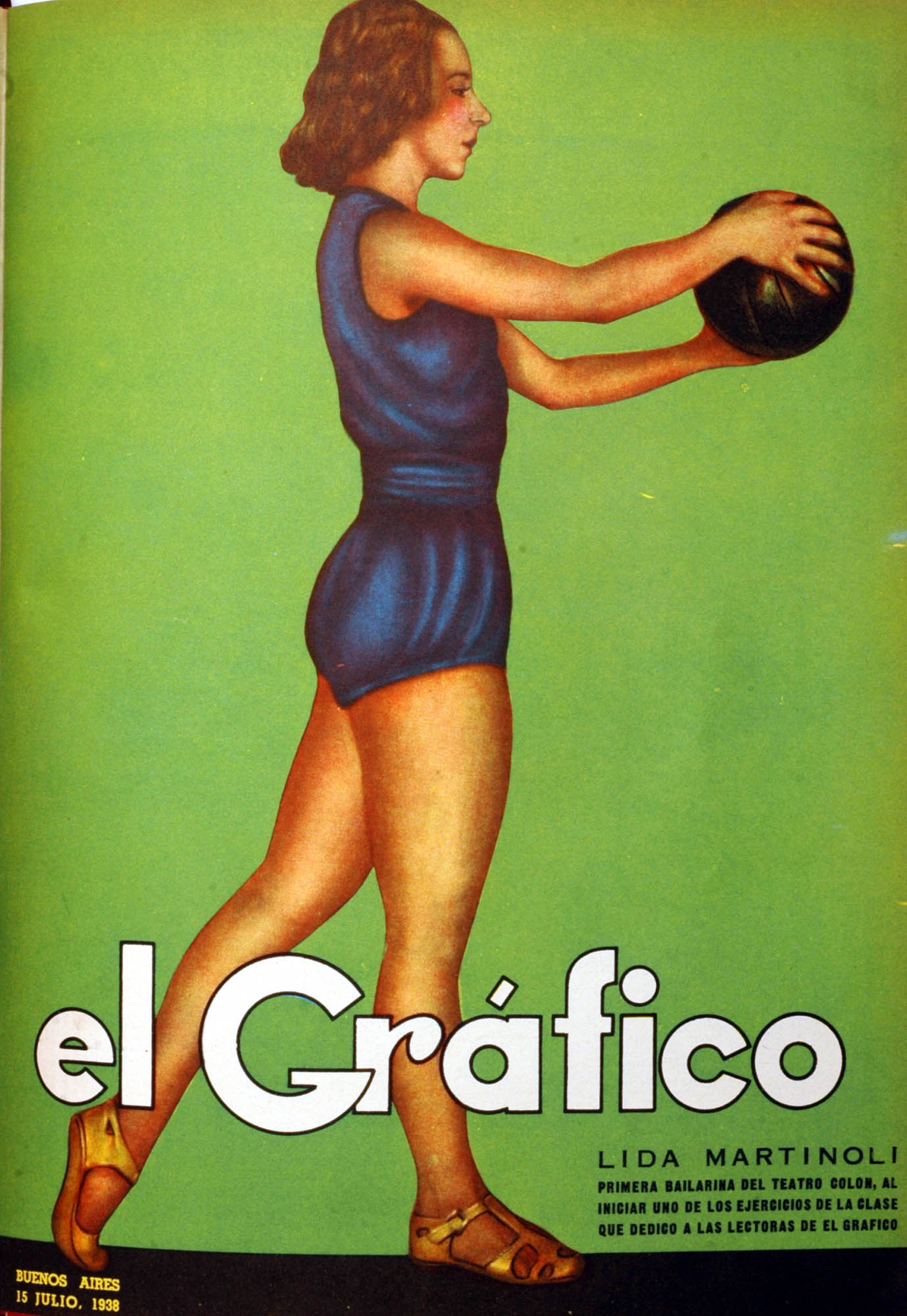 Lida Martinoli. El Grafico del 15 de Julio de 1938. Edicion 992